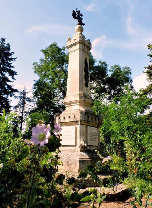 Паметник на херцог Сергей Максимилианович, княз Романов и принц Лайхтенбергский, убит на 12/24 октомври 1877 г. по време на разузнаване при с. Иваново, Русенско от вражески крушум.